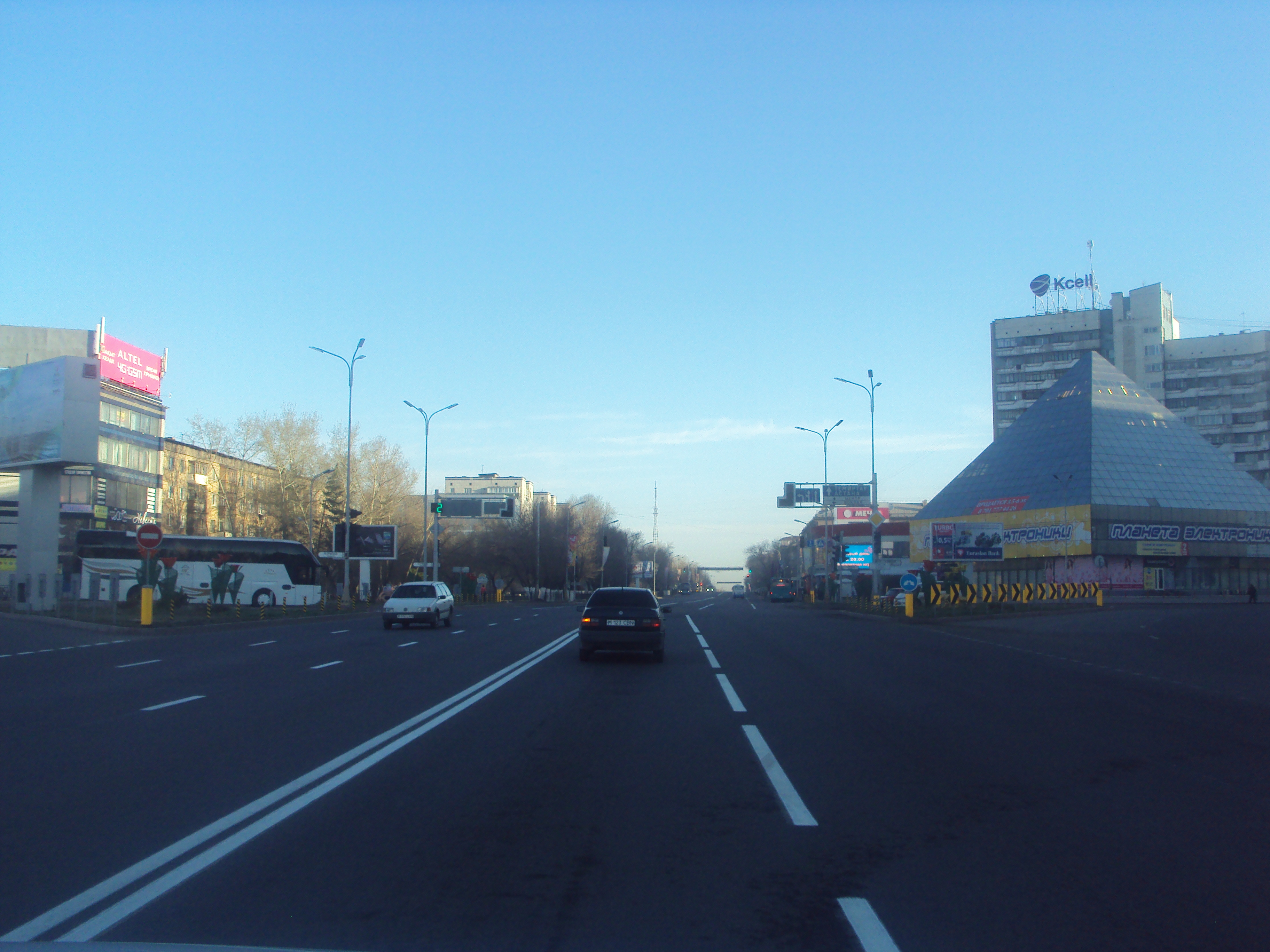 Транспортный узел Караганды - пересечение проспекта Бухар-Жырау и улицы Ермекова.